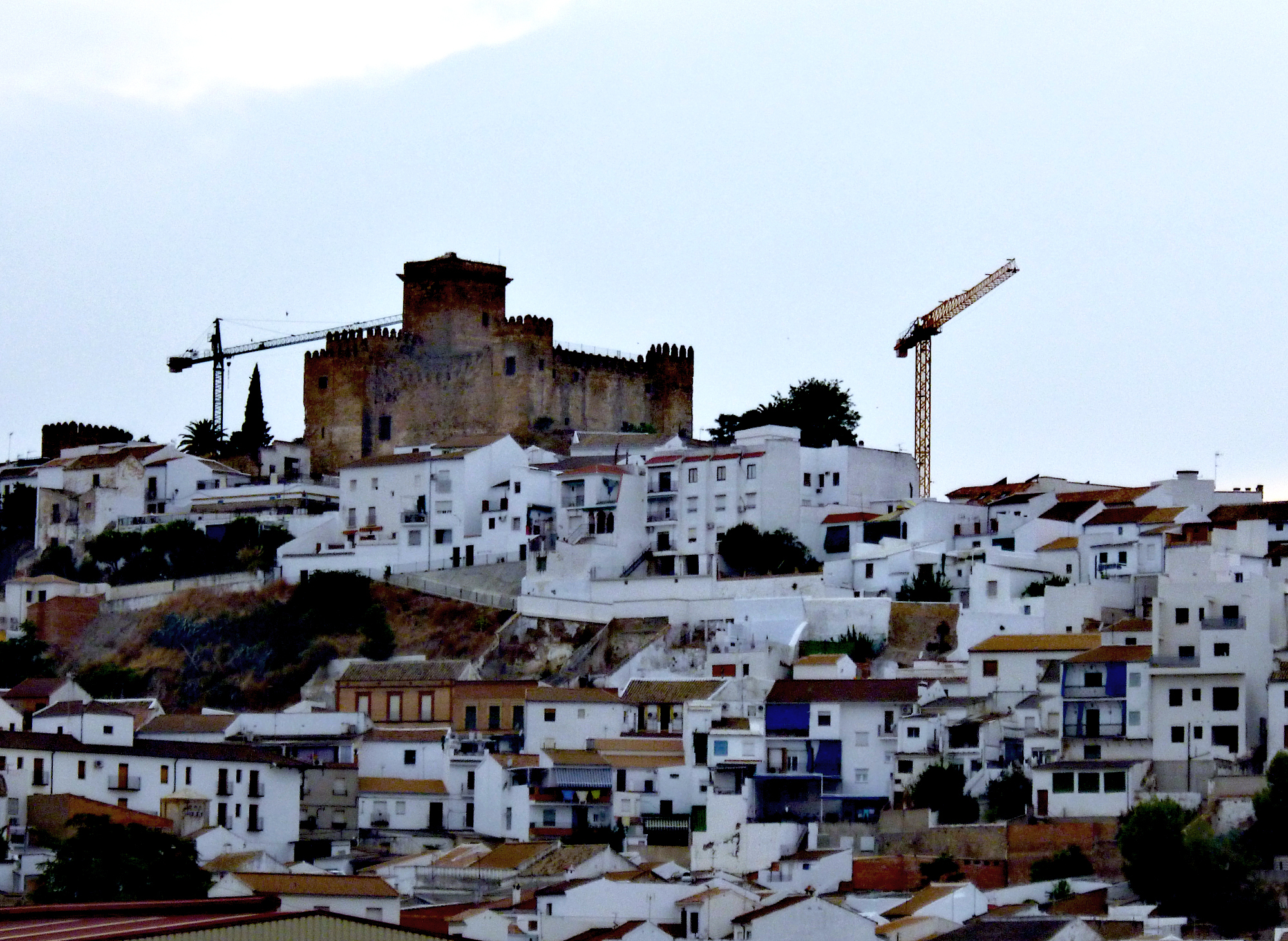 Castelo de Espejo